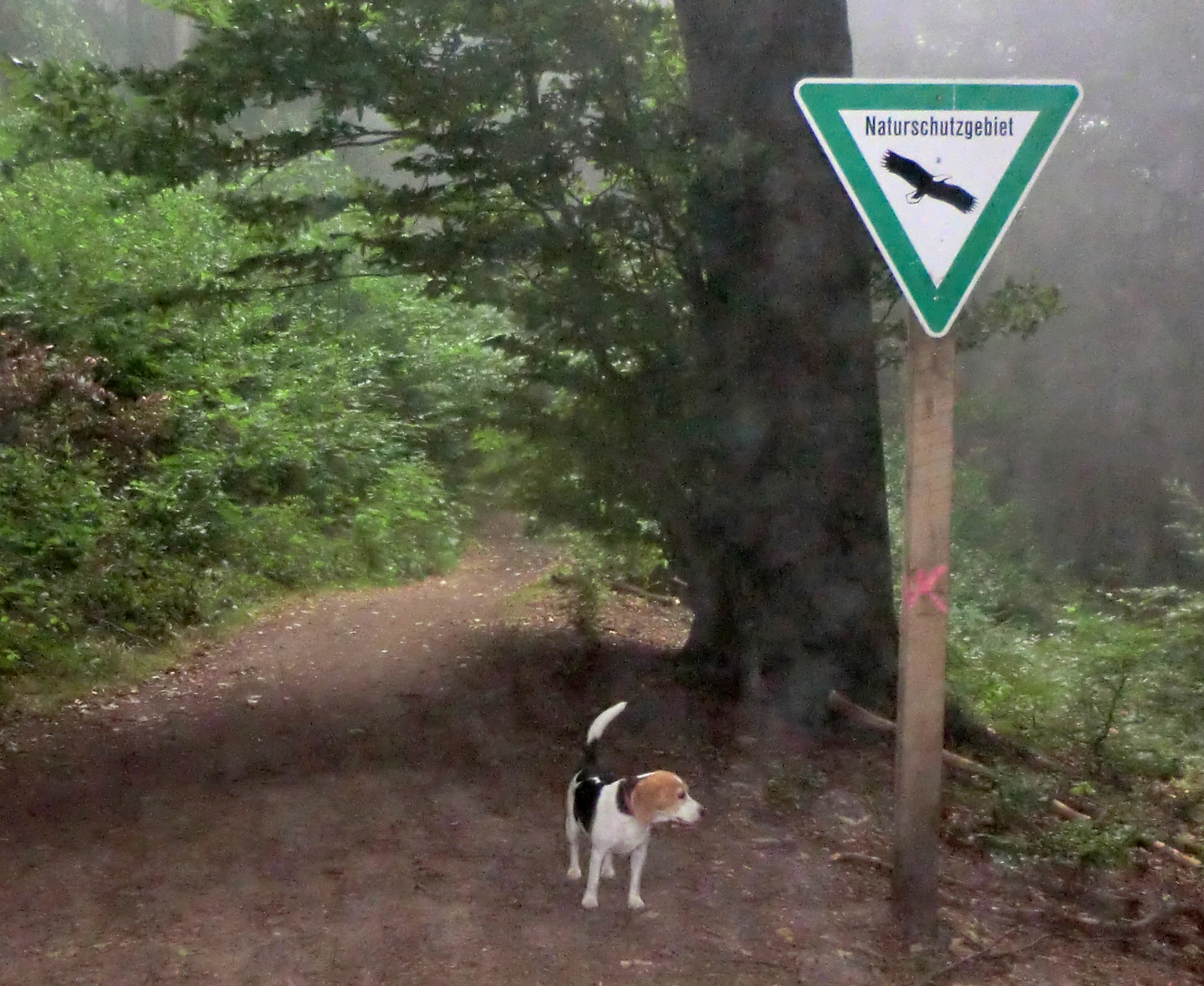 Naturschutzgebiet „Wittekindsberg“ (NSG MI-038): NSG-Hinweisschild am Wittekindsweg rund 50 Meter östlich der Habichtswand am Häverstädter Berg.